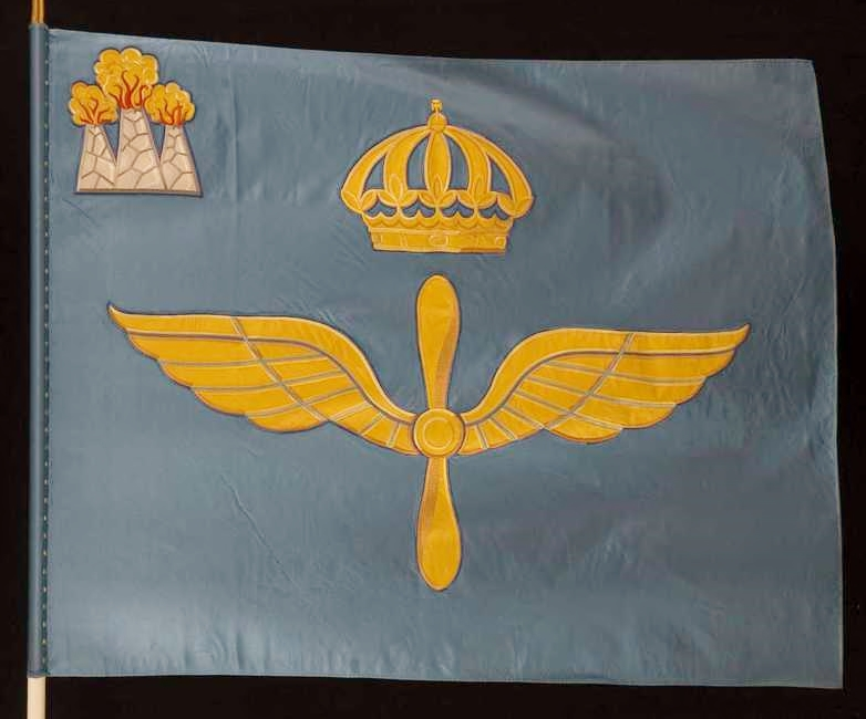 Kungl. Västmanlands flygflottilj åren 1938-1983. Fanan överlämnad till Uppsalas flygflottilj i juli 1983, detta i samband med avvecklingen av Västmanlands flygflottilj.